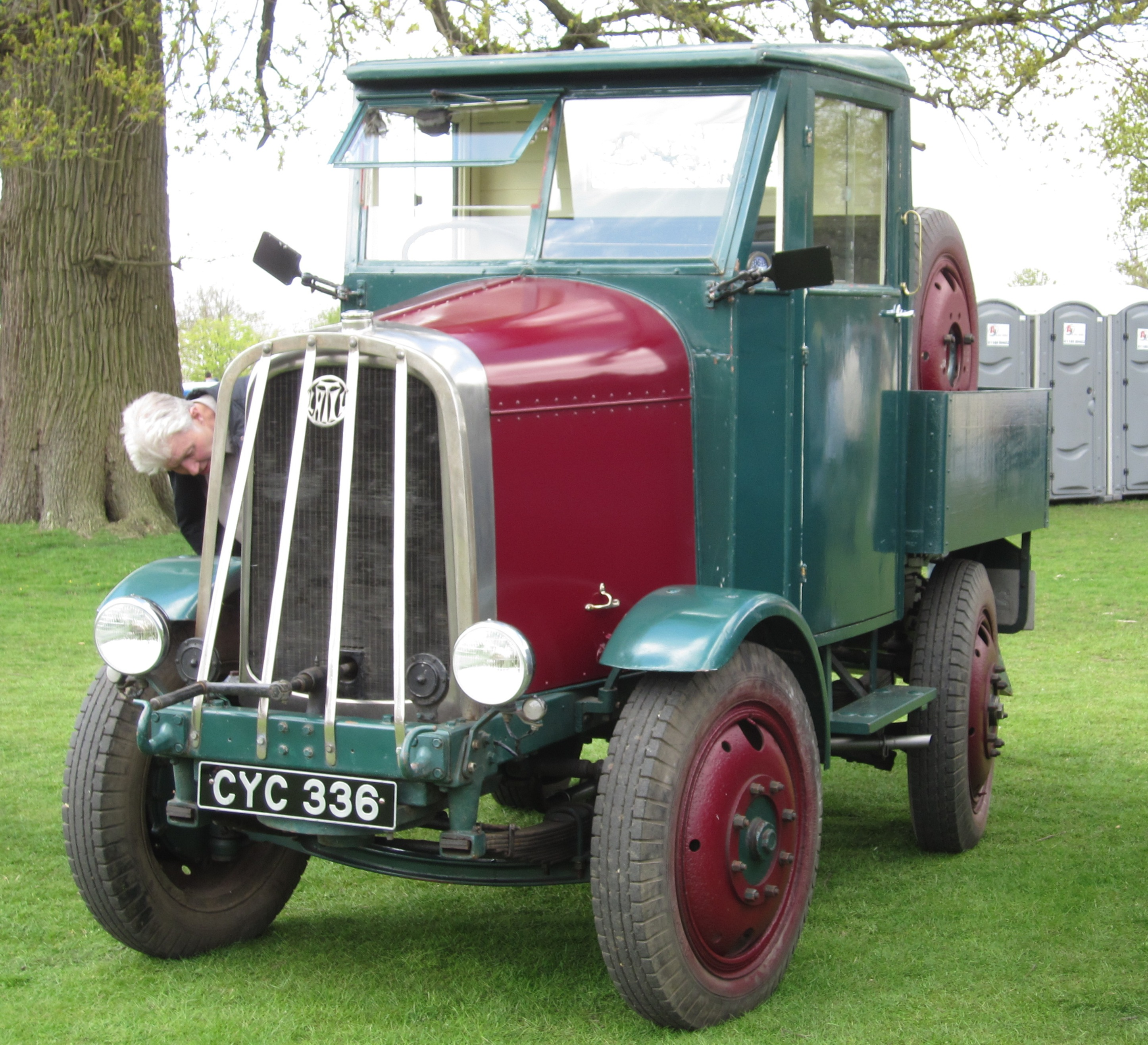 Latil 4X4 (1937) en Angleterre